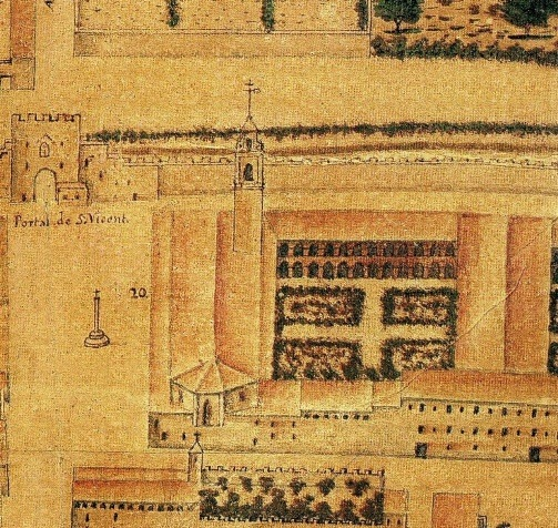 El convent de sant Agustí com apareix al plànol del Pare Tosca (1704) de la ciutat de València. Apareix també el desaparegut Portal de Sant Vicent.